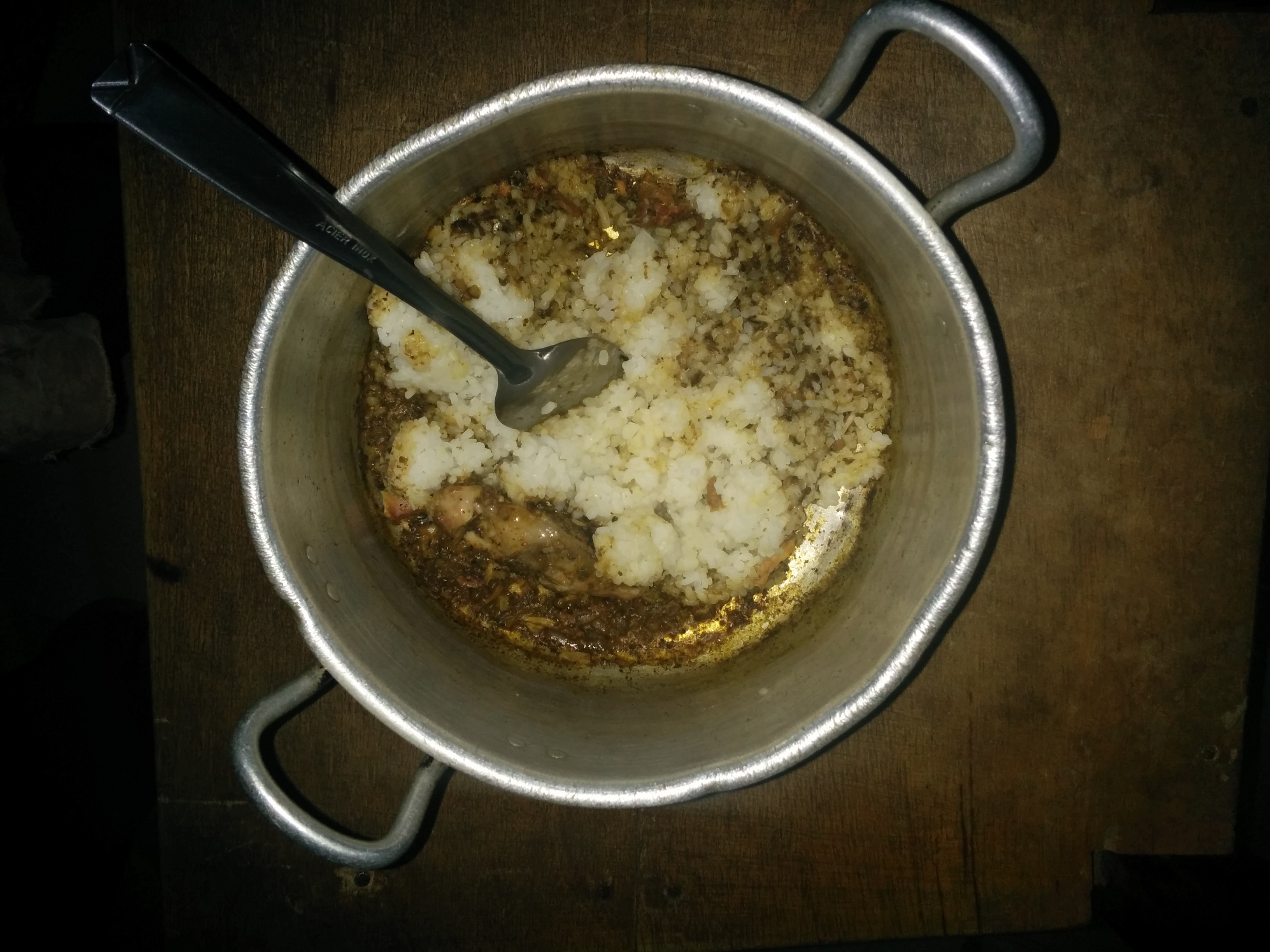 Du riz couché à la sauce djoumblé This is an image of food from Ivory Coast